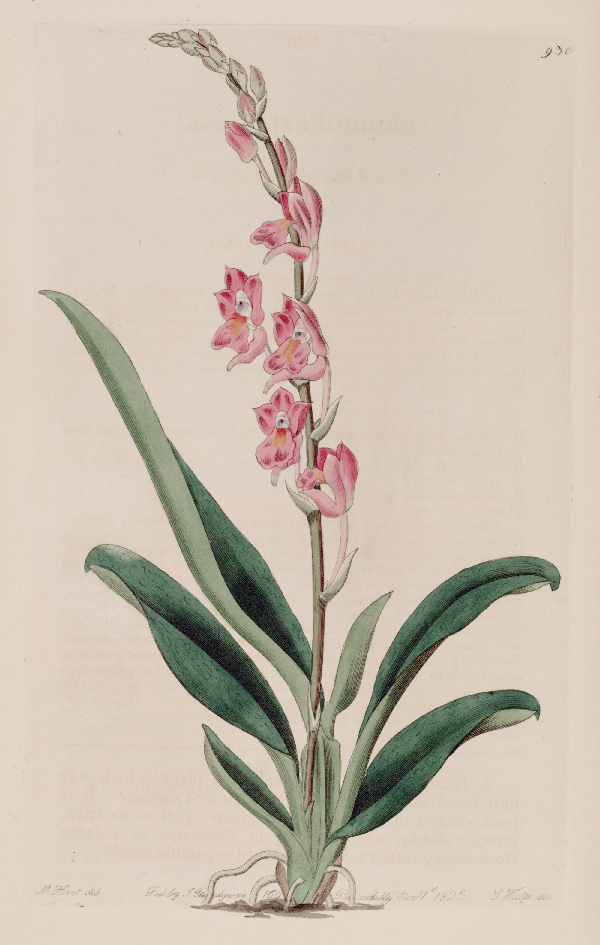 Illustration of Rodriguezia lanceolata (as syn. Rodriguezia secunda, fig. II)